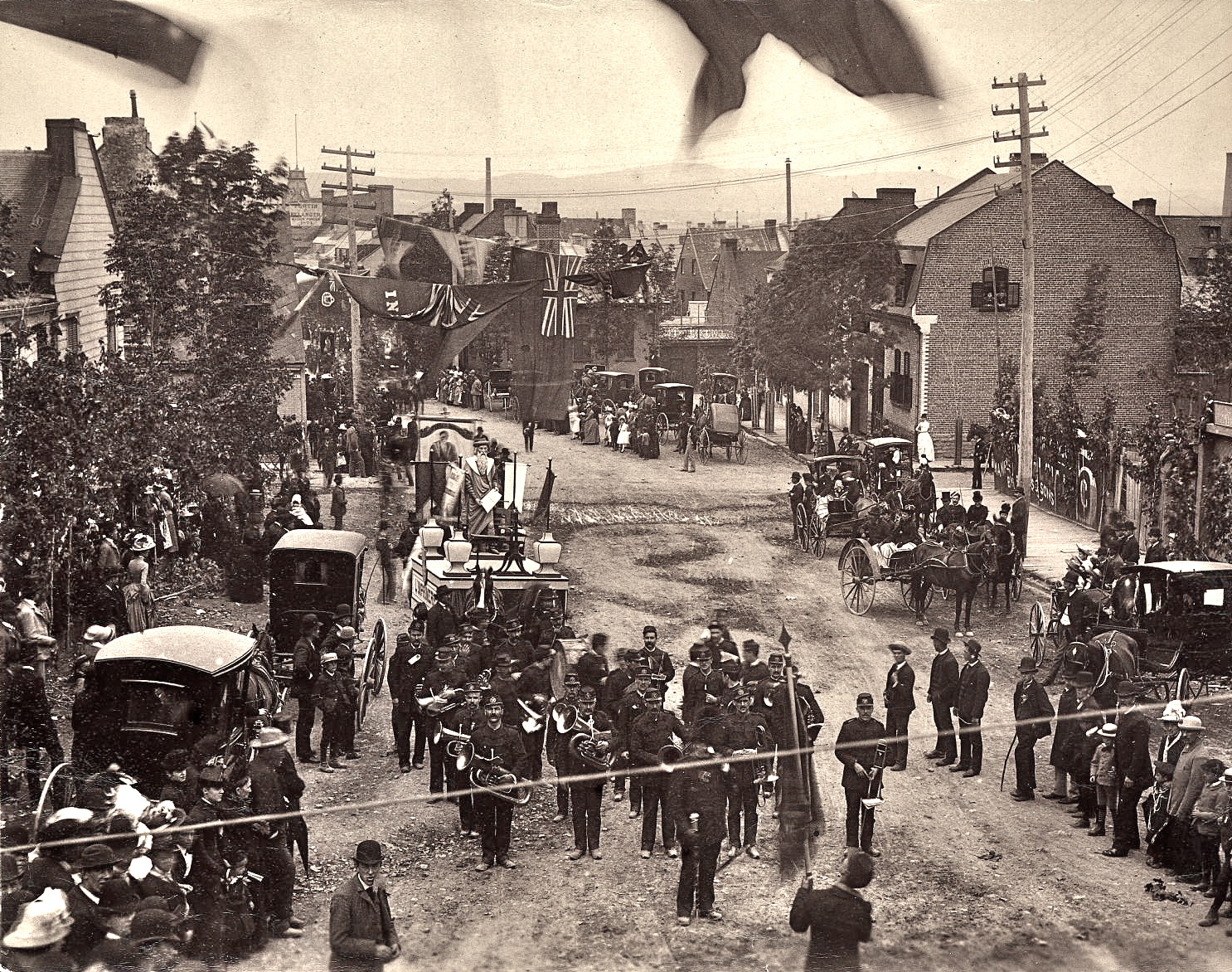 Photo prise au cours d'une parade de la Saint-Jean-Baptiste, sur la rue Saint-Vallier, à Québec. Le char allégorique qui passe représente « Gutemberg / l'imprimerie »